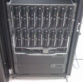 Origine : Auteur